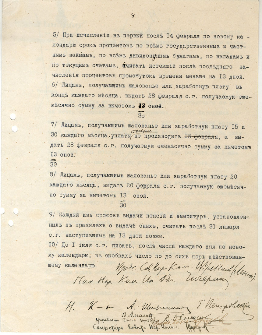 Dekreet Lääne-Euroopa kalendri kehtestamisest Venemaa Vabariigis (lk 2(2))